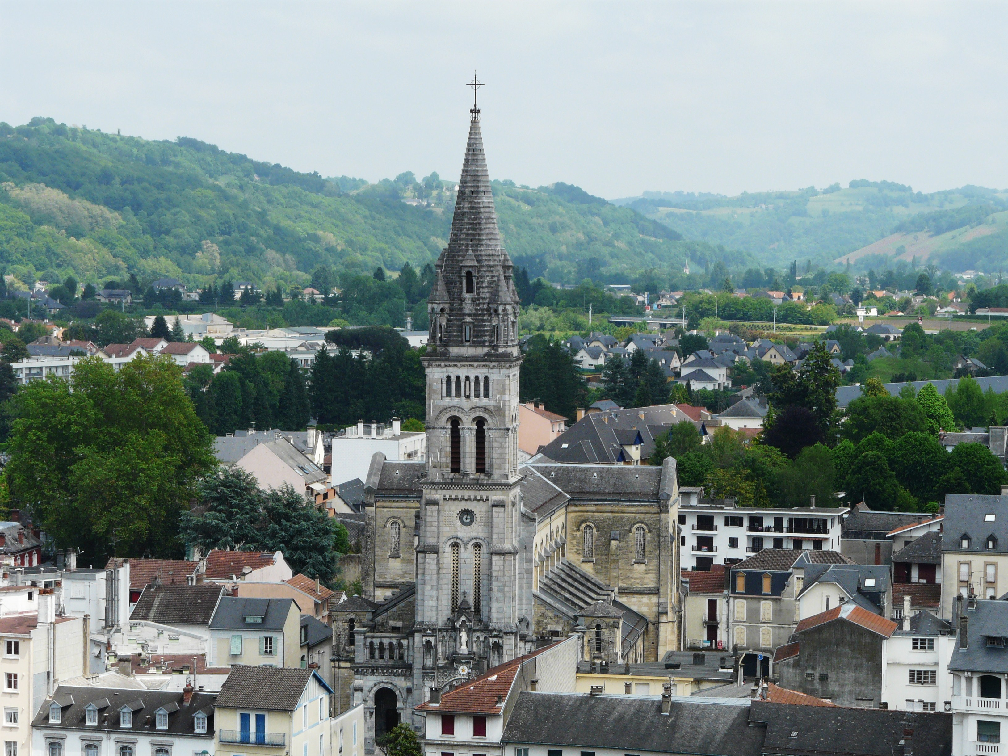 L'église du Sacré-Cœur vue depuis le château, Lourdes, Hautes-Pyrénées, France.